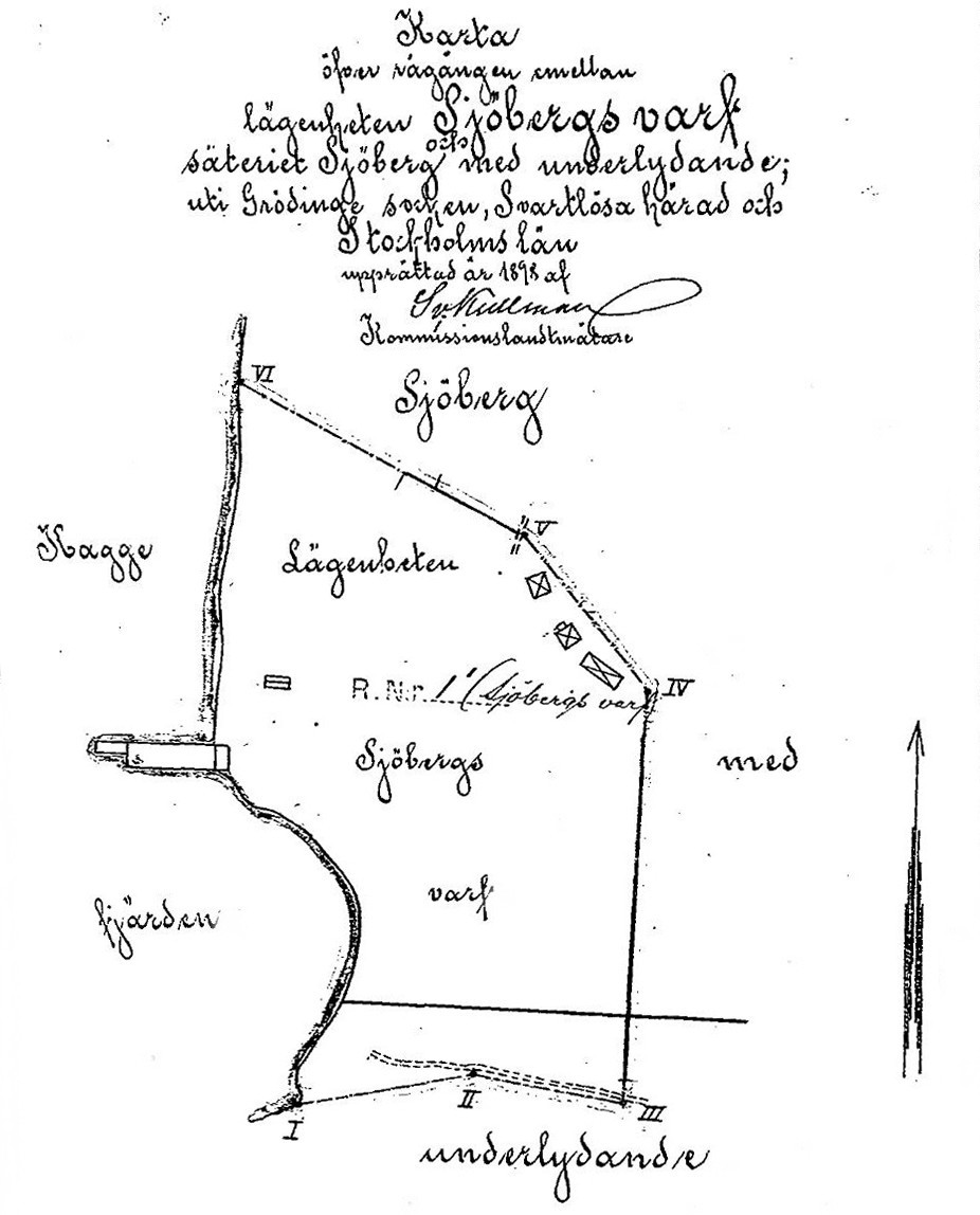 Karta över Sjöbergs varv i Grödinge socken